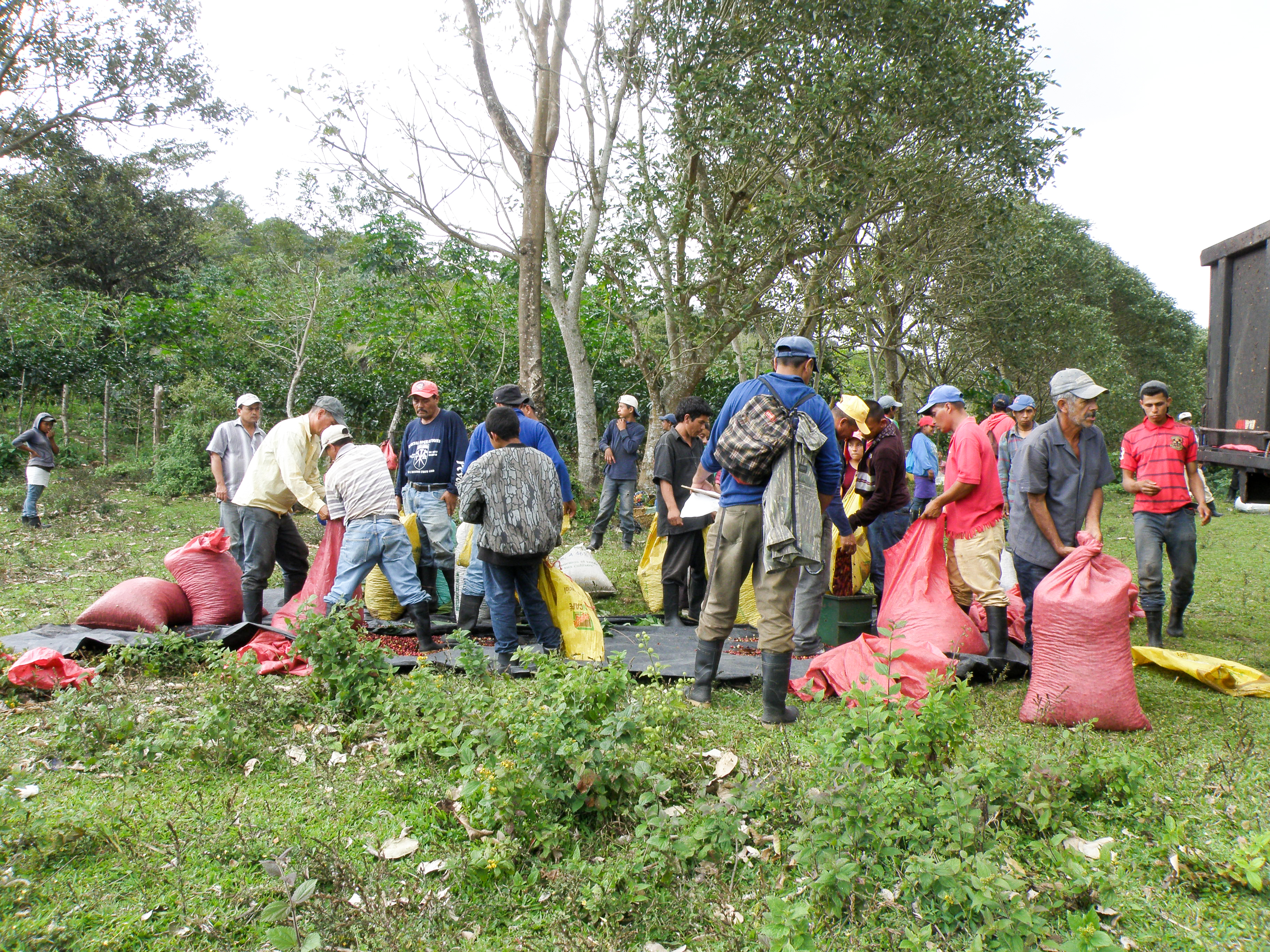 La récolte des grains commencée ce matin se termine par la pesée qui détermine le salaire versé.